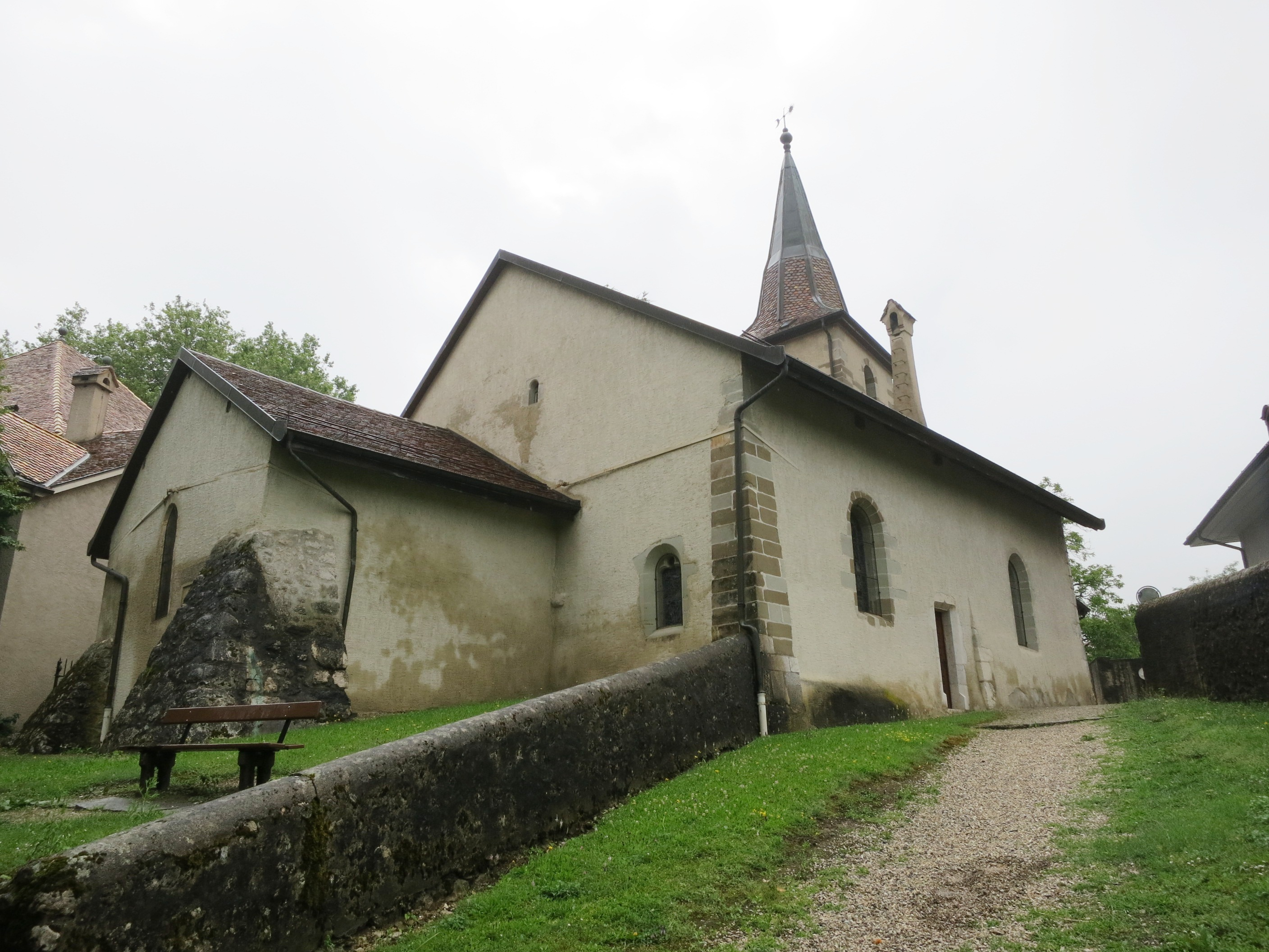 Kirche Gingins VD, Schweiz